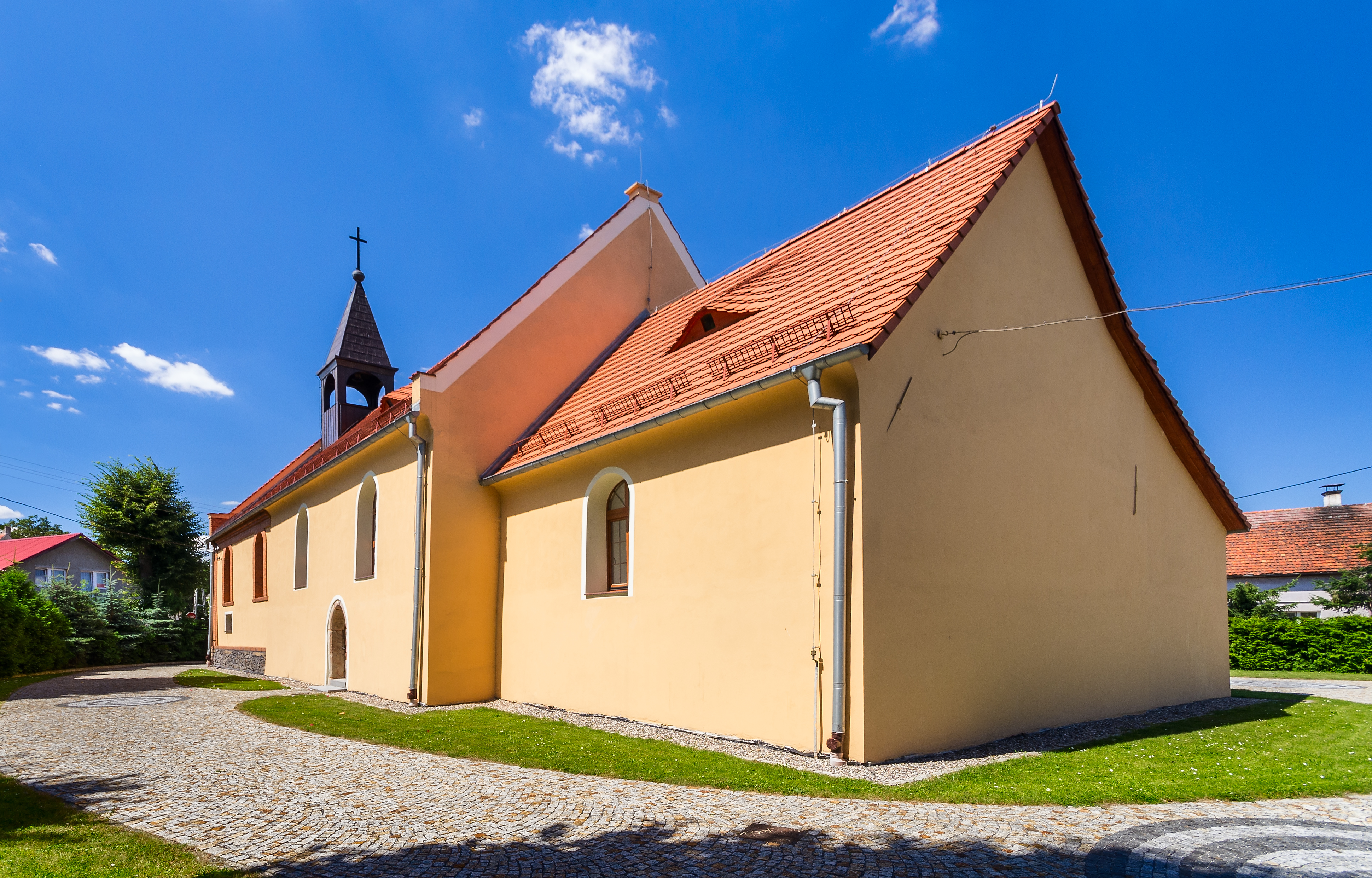 Piskorzów - rzymskokatolicki kościół filialny pw. św. Jana Nepomucena, XVI, 1730, 1921